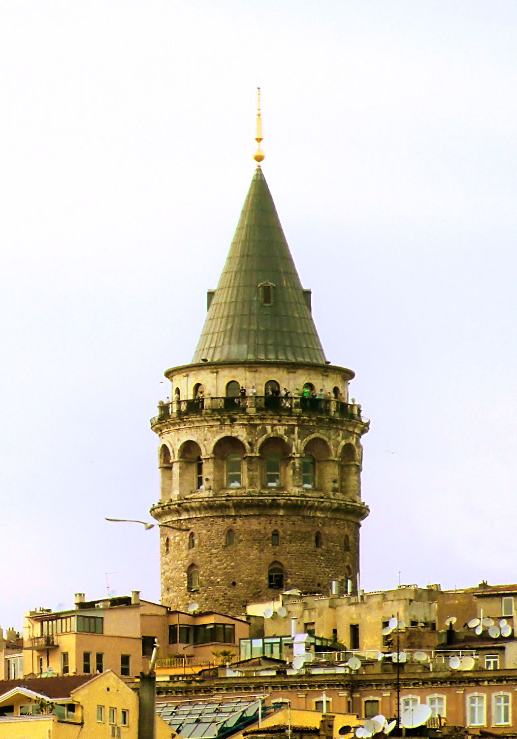 Stambuł, Wieża Galata, widok z Bosforu; Istambul, Galata tower, a view from Bosphorus